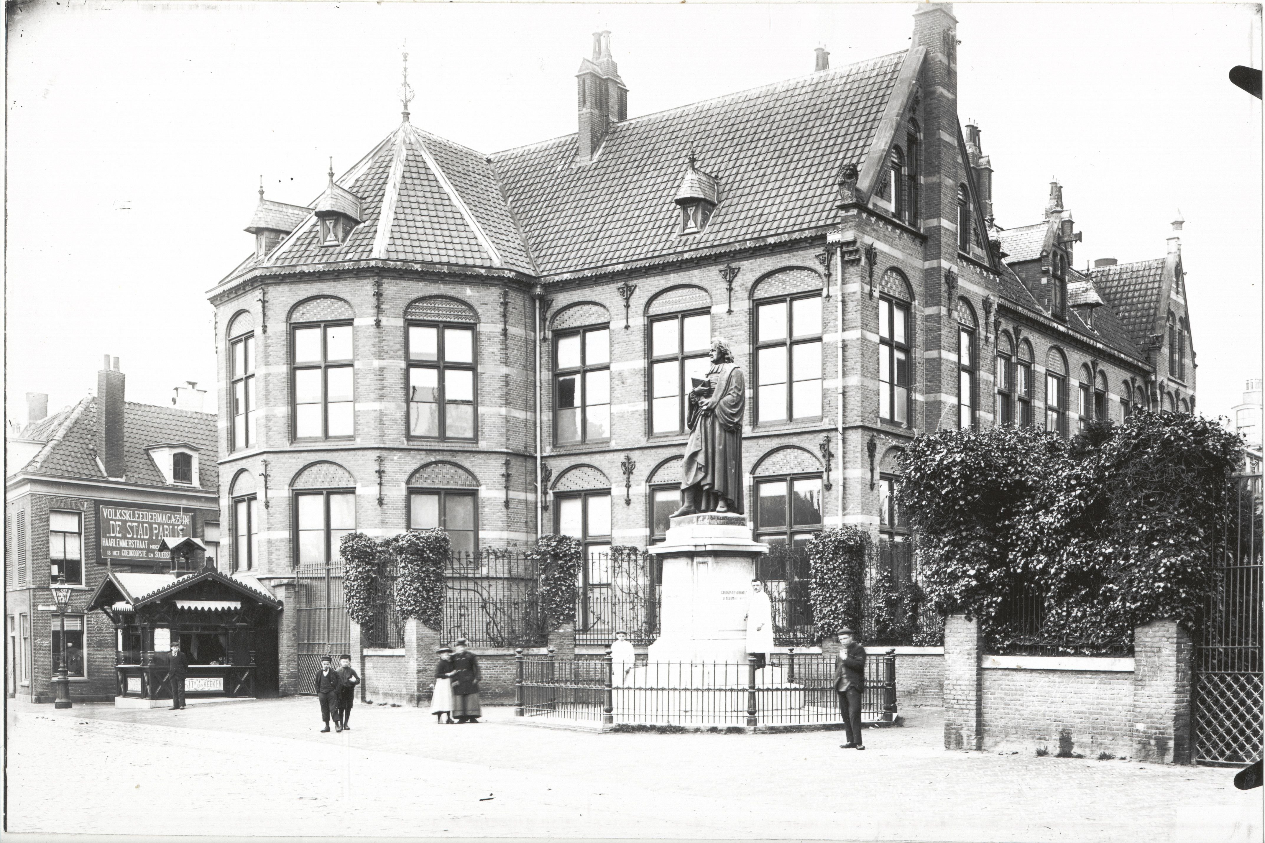 Herman Boerhaave"", bronzen standbeeld van J.Stracke (1817-1891) op een sokkel staande voor het Academisch Ziekenhuis Leiden aan de Steenstraat 1, omgeven door een ijzeren hek. Links de hoek eerste Binnenvestgracht/Steenstraat. Boerhaavelaboratorium op de achtergrond. Naar het zuidwesten gezien.